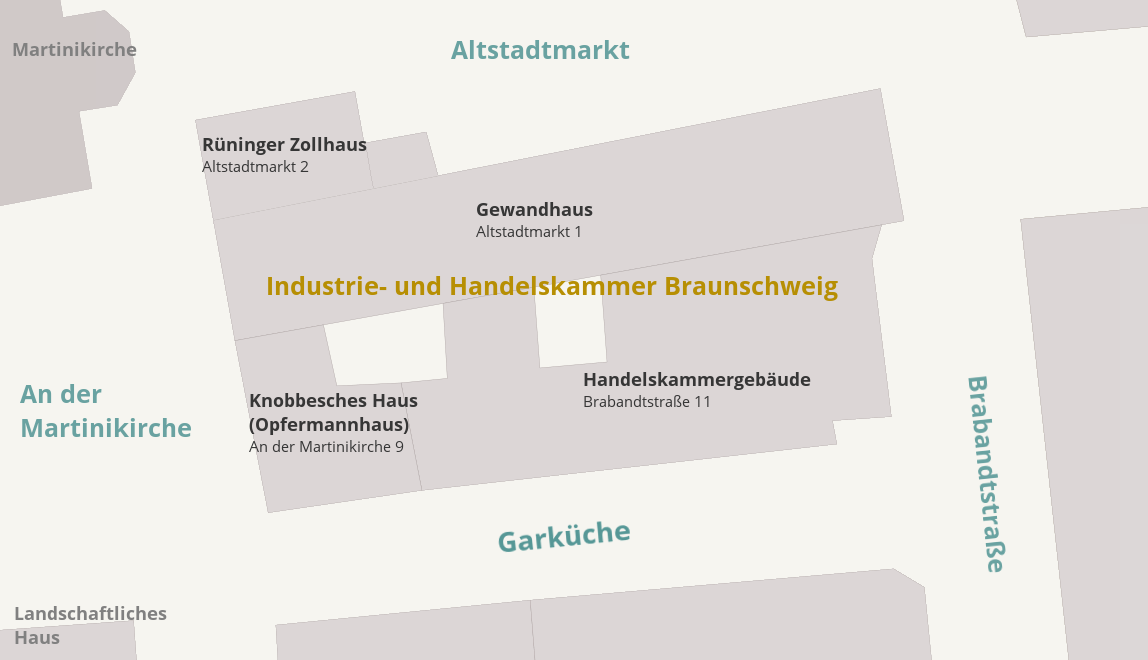 Übersicht des Gebäudeensembles der Industrie- und Handelskammer (IHK) Braunschweig.